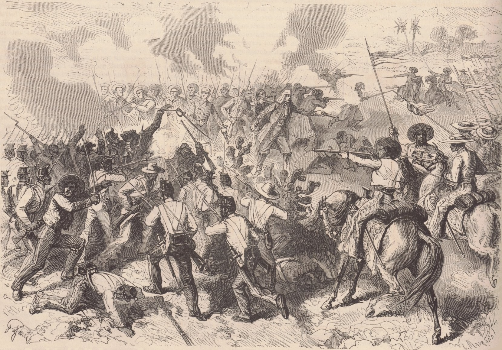 Mexique. — L'escorte gu général Cortès, commandée par le capitaine de frégate Gazielle, est attaquée par les forces de colonel Rosalès près de San-Pedro. (Croquis de M. C. V.).